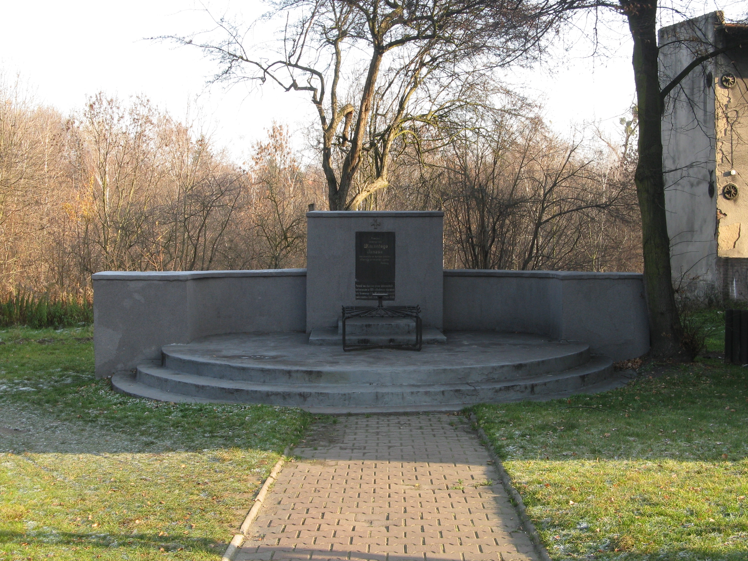 Pomnik pamięci Wincentego Janasa (1891–1919) w Rudzie Śląskiej przy ulicy Piastowskiej.